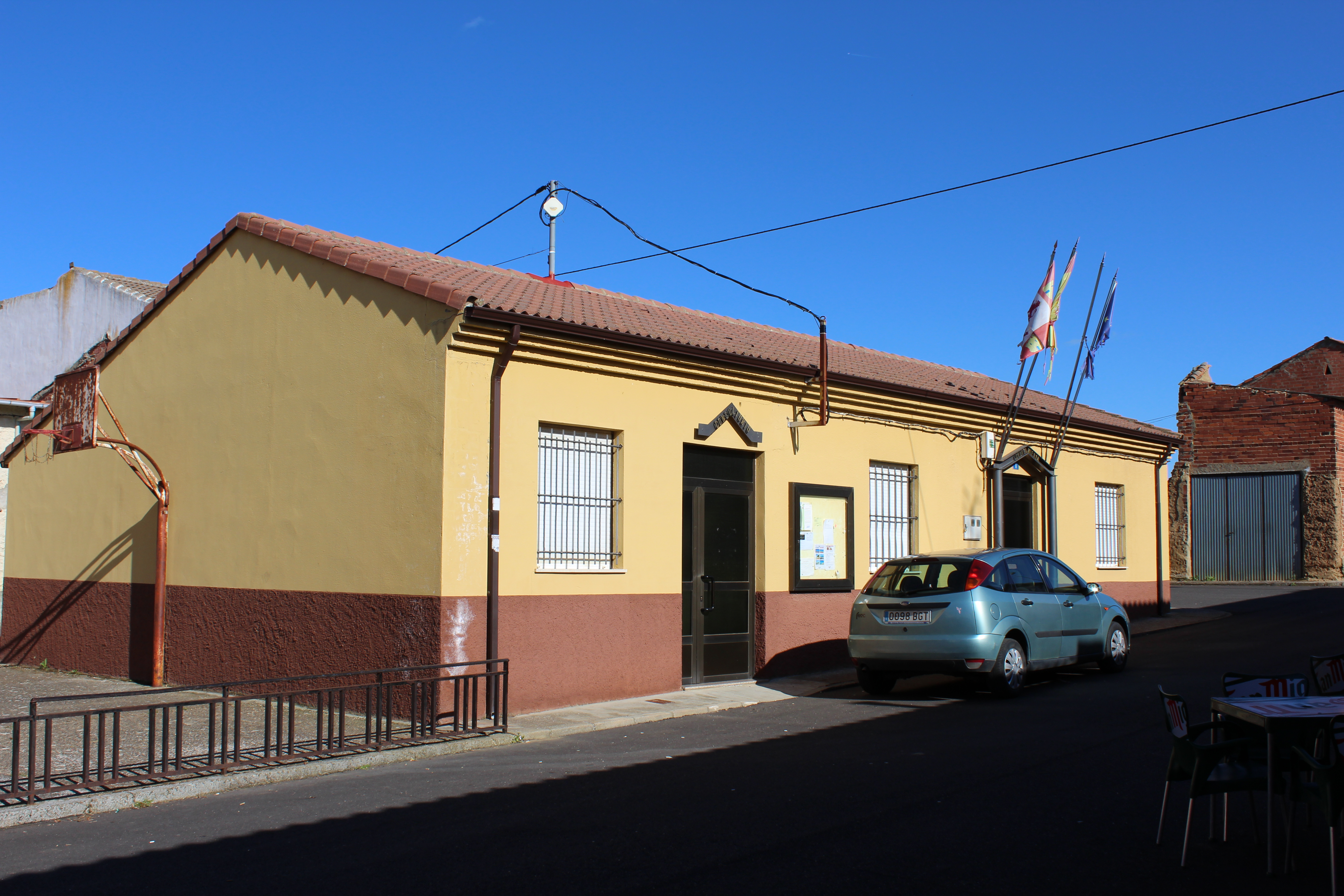 Ayuntamiento de Cubillas de los Oteros